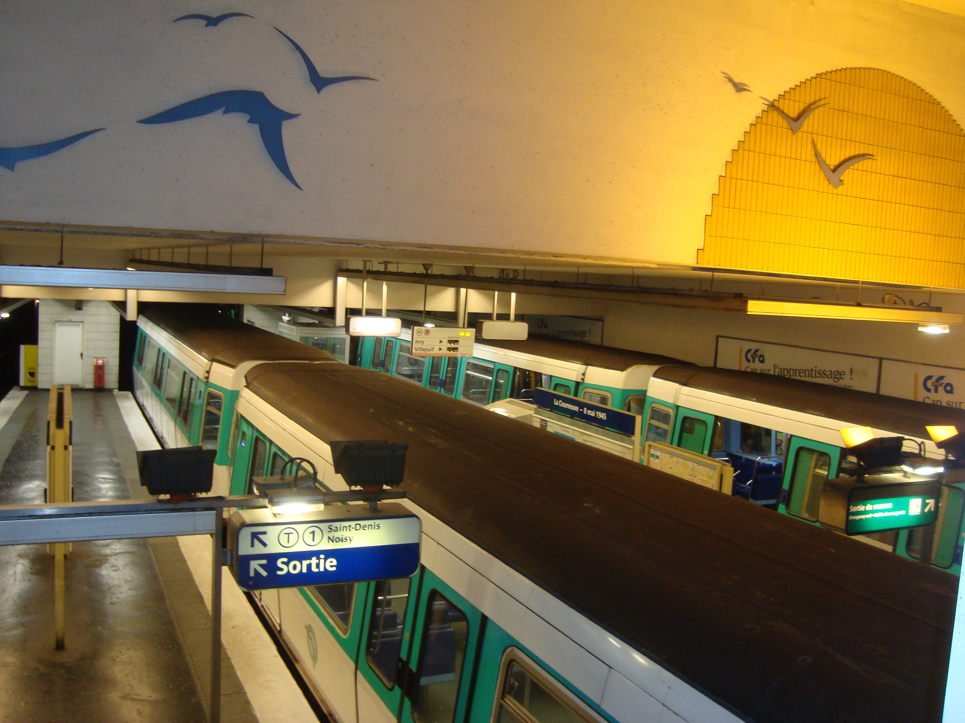 Deux rames prêtes au départ à la station de métro La Courneuve - 8 mai 1945. Au plafond, fresque.